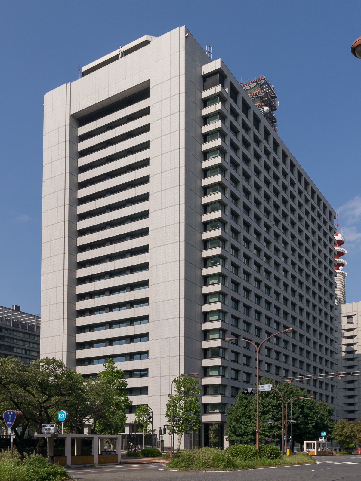 中央合同庁舎2号館、総務省、警察庁など。東京都千代田区霞が関。